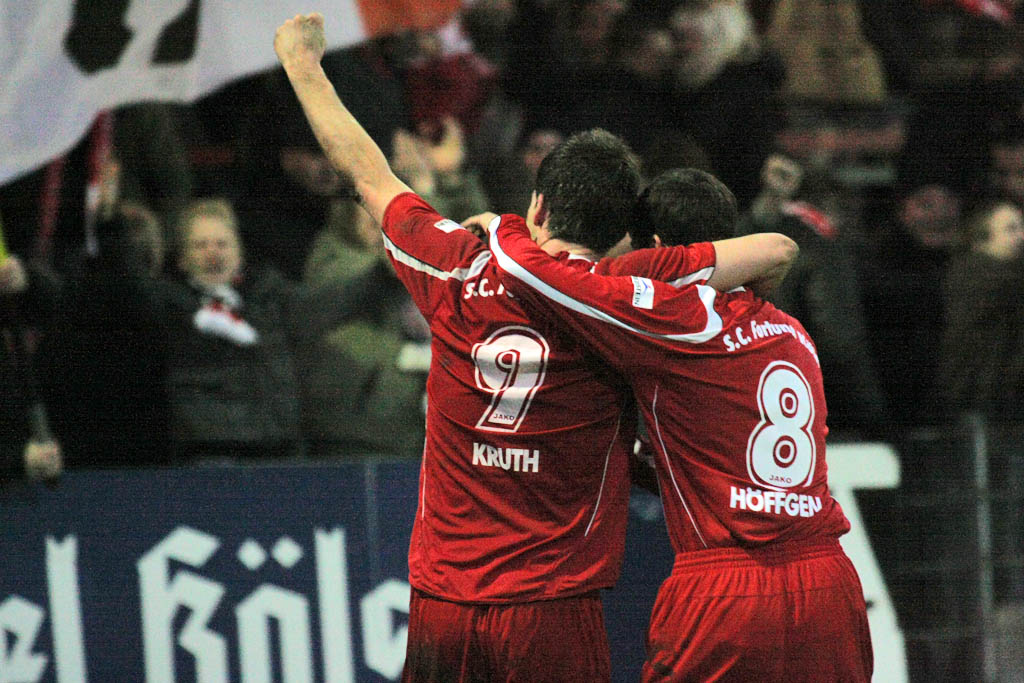 Kevin Kruth und Fabian Höffgen von Fortuna Köln beim Torjubel über das 3:1 gegen Westfalia Herne